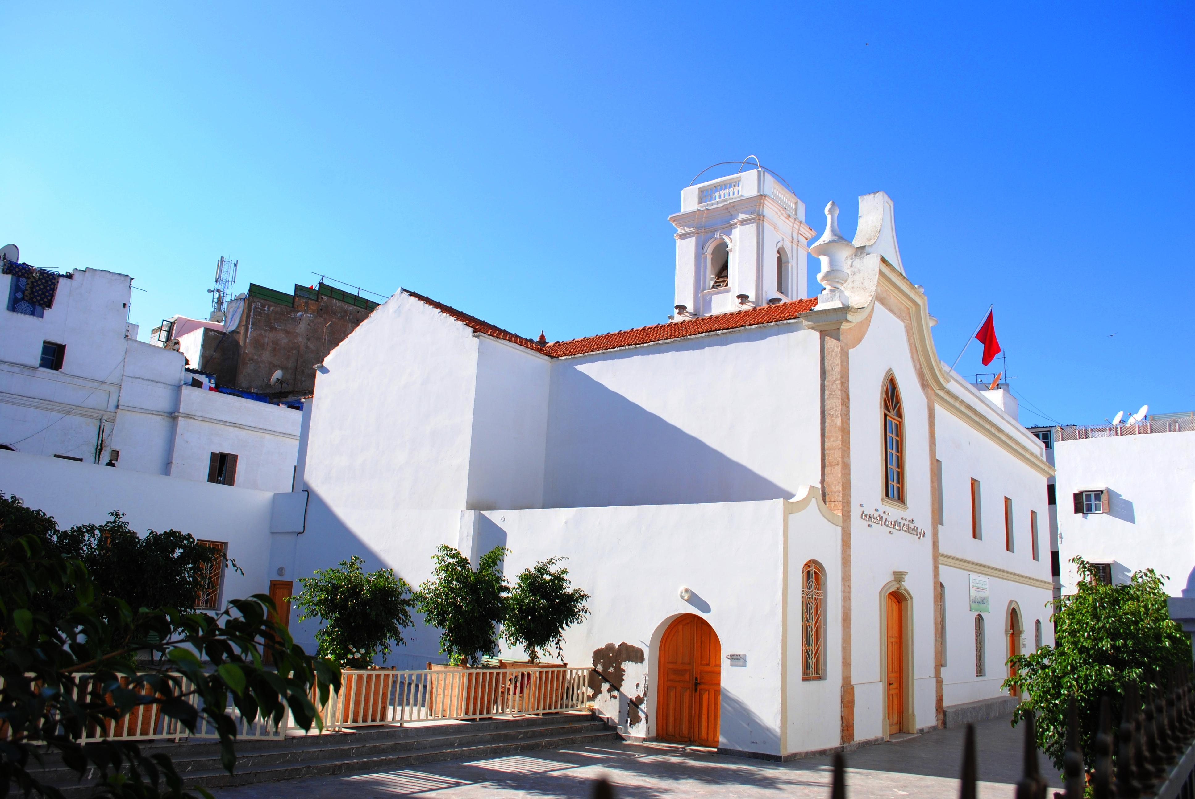 Ancienne Eglise Santa Buenaventura rénovée et transformé en centre culturel